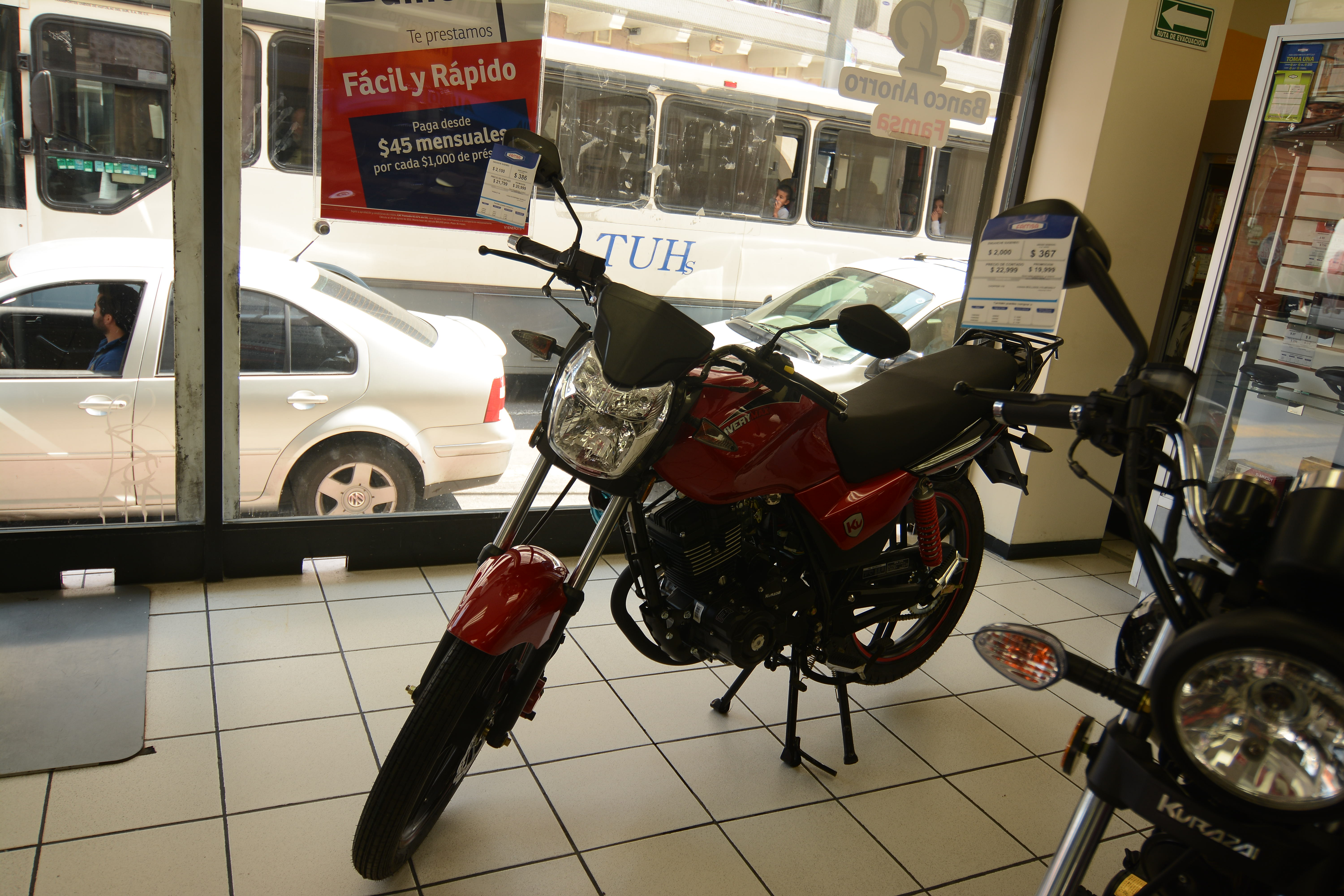 Motocicleta de trabajo Kurazai Dlivery modelo 2015